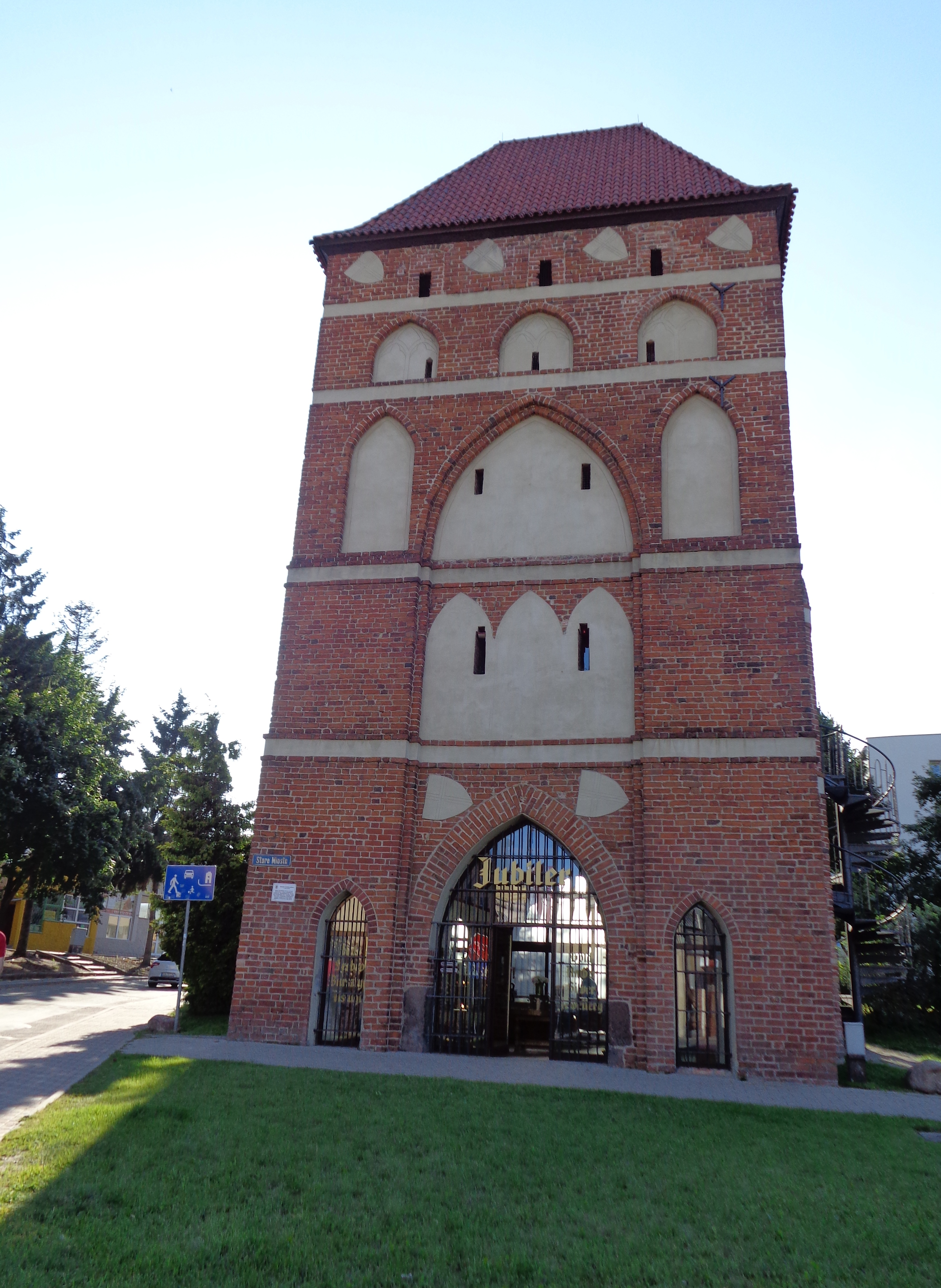 Malbork, Brama Garncarska (Św. Ducha, Elbląska), 2 poł. XIV